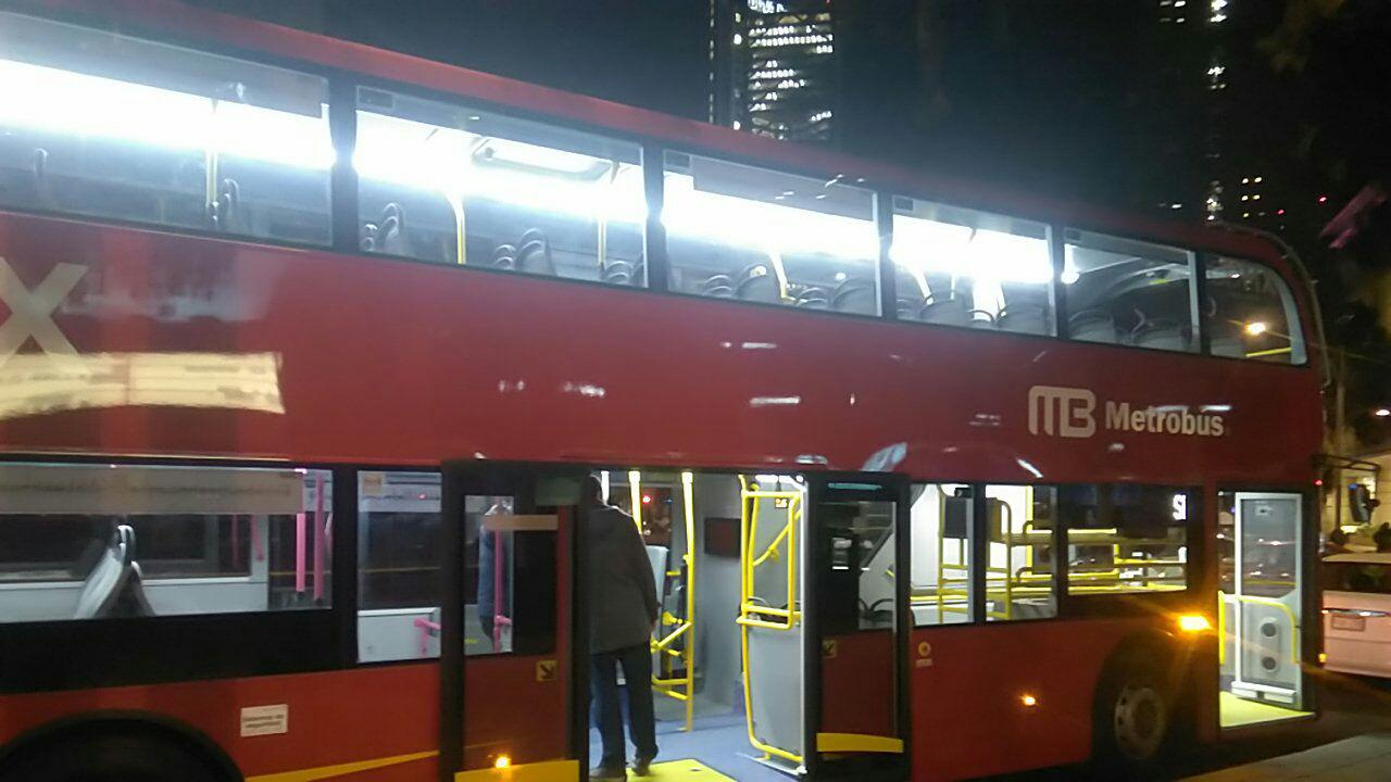 Autobuses de doble piso para uso en linea 7 del metrobus